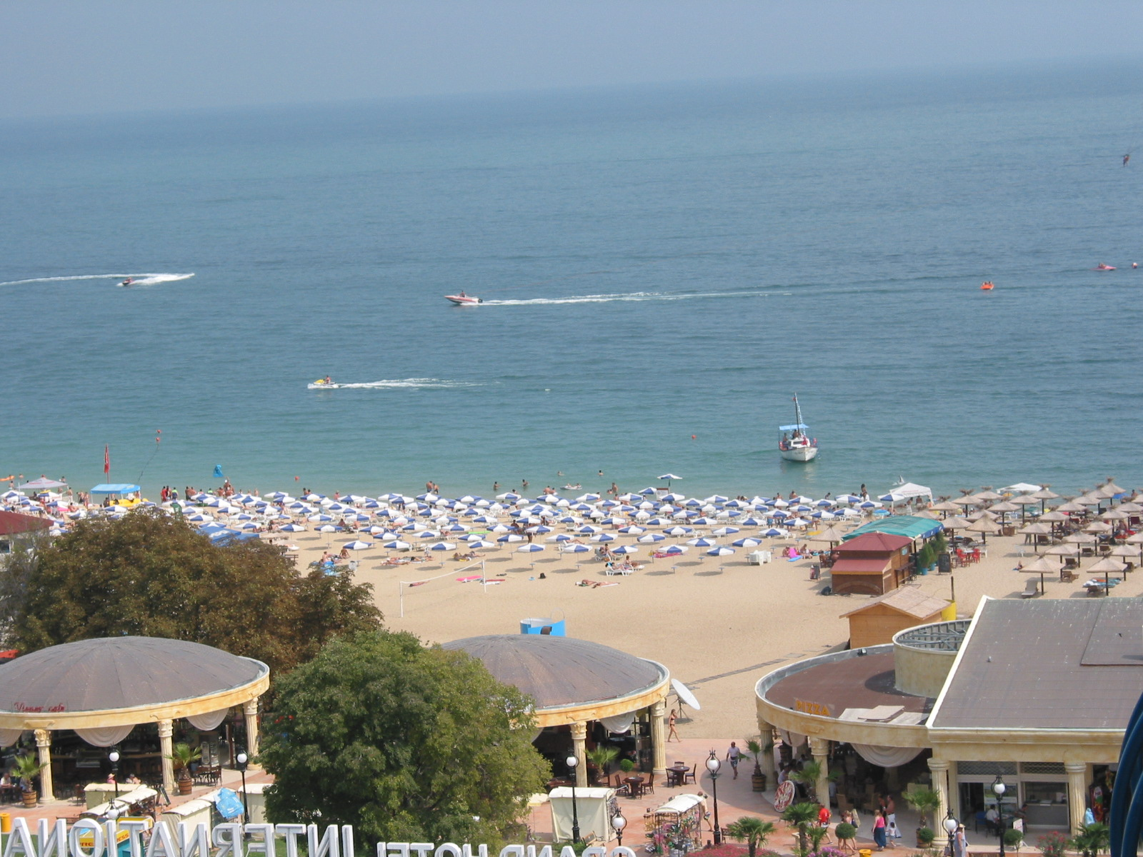 de: Goldstrand (Златни пясъци) en: Golden Sands